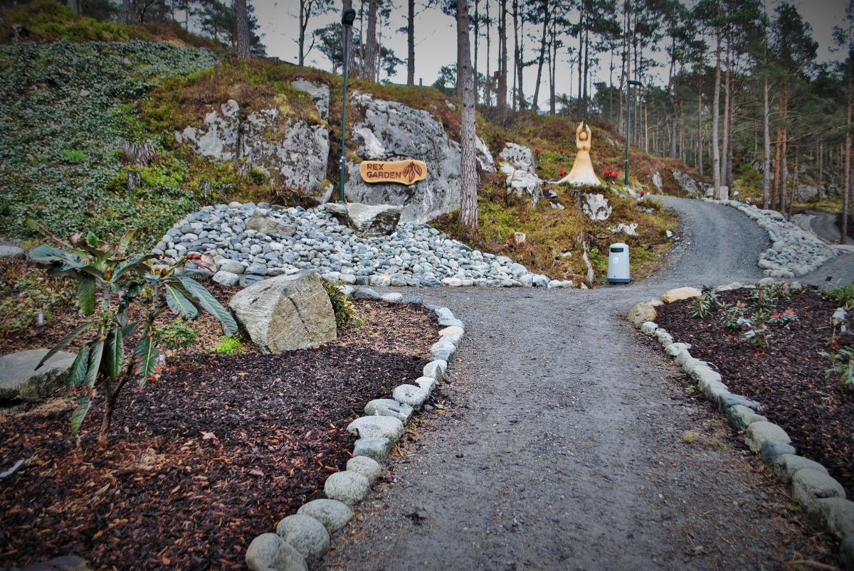 Parken ligger i Førde i Sveio i kommune. Foto